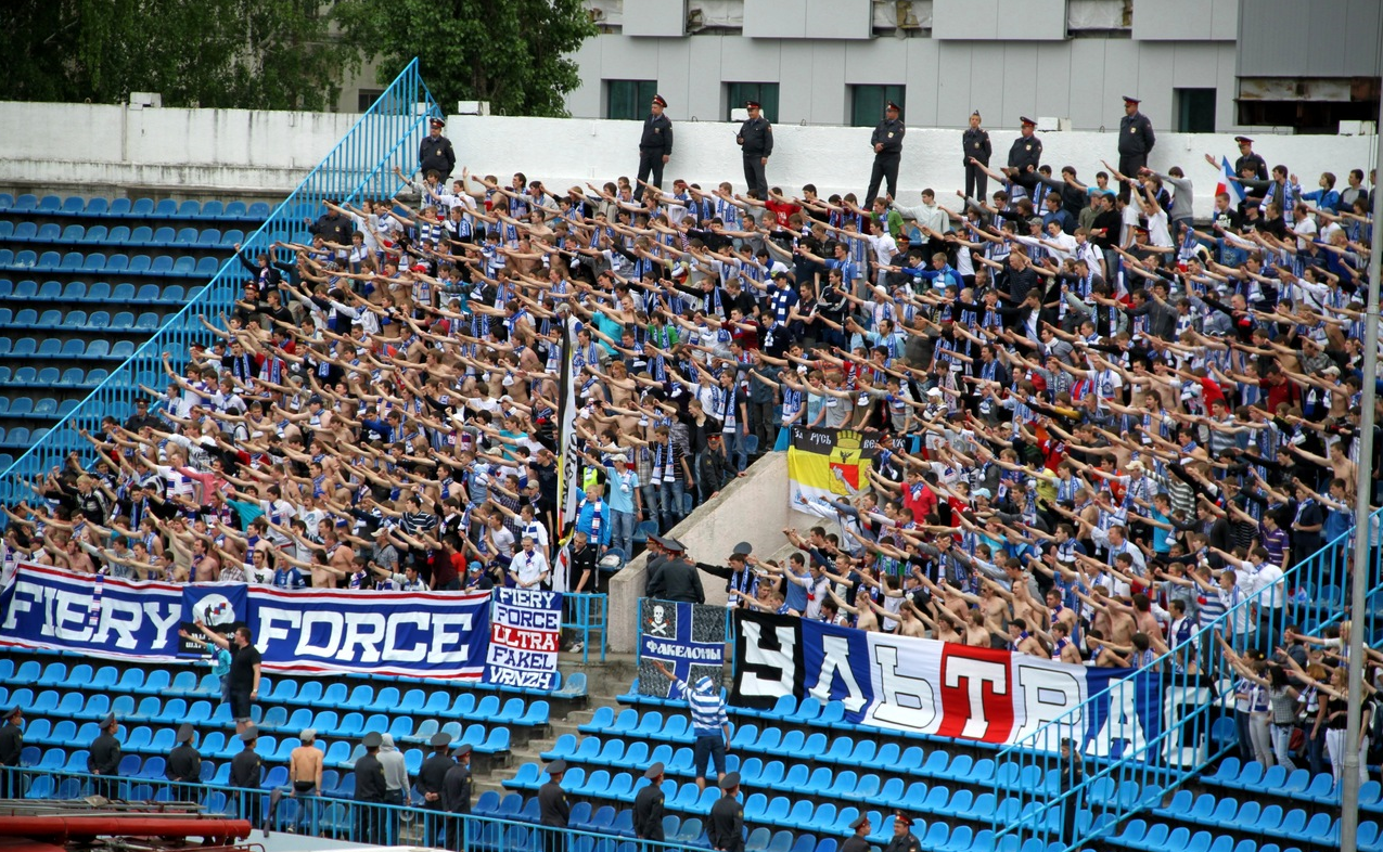 Фанаты "Факела" в ФНЛ